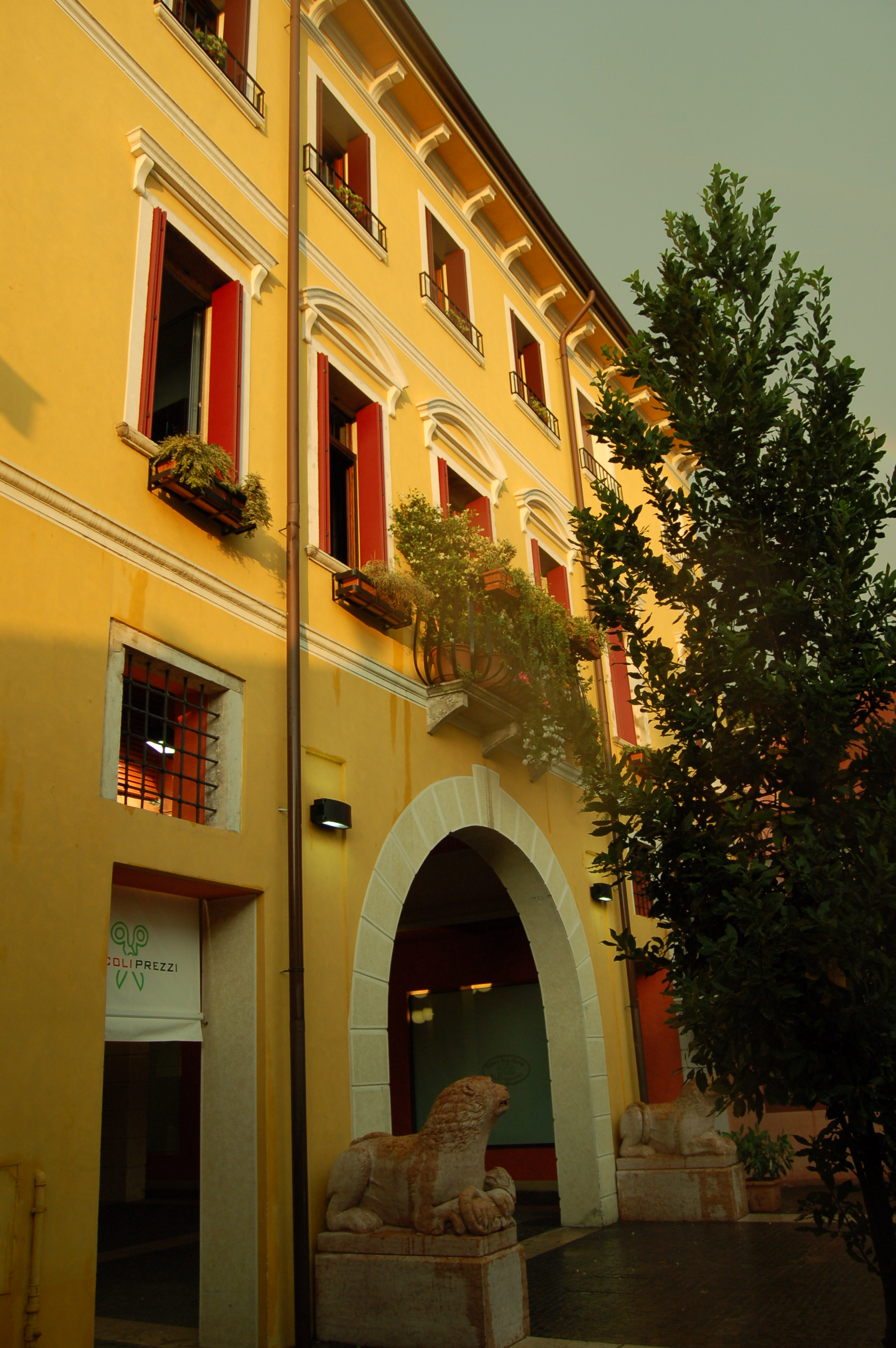 Antica Porta della città - Porta Trevisana